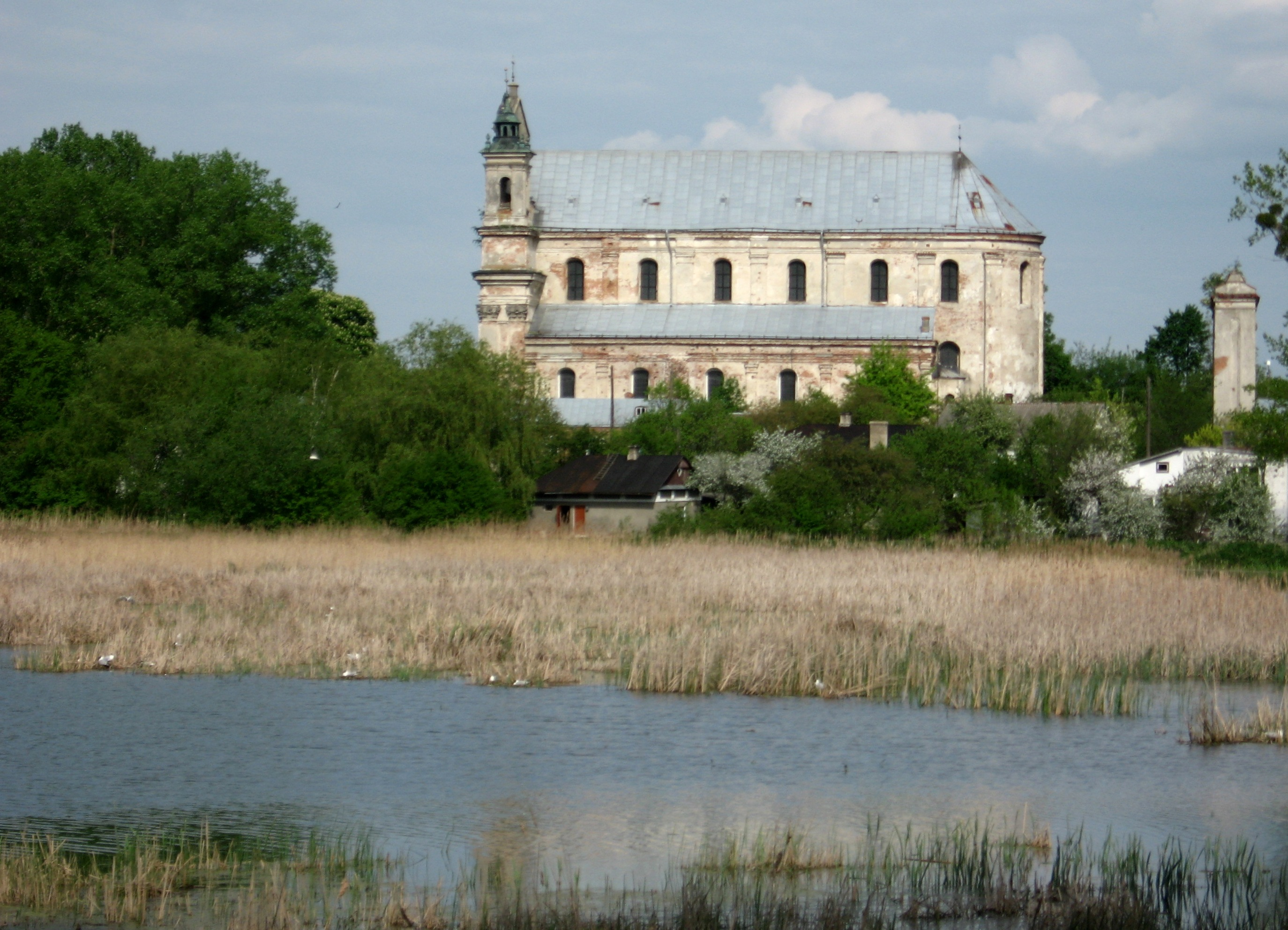 Widok na kolegiatę w Ołyce